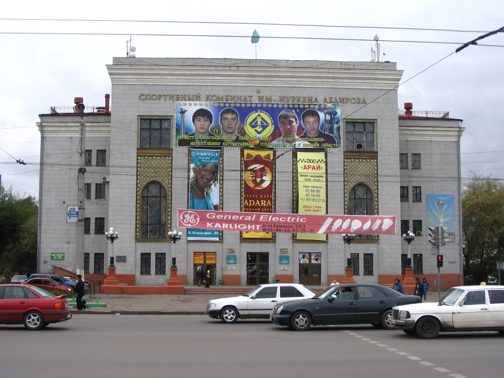 Название: Спортивный комбинат им. Нуркена Абдирова. памятник архитектуры